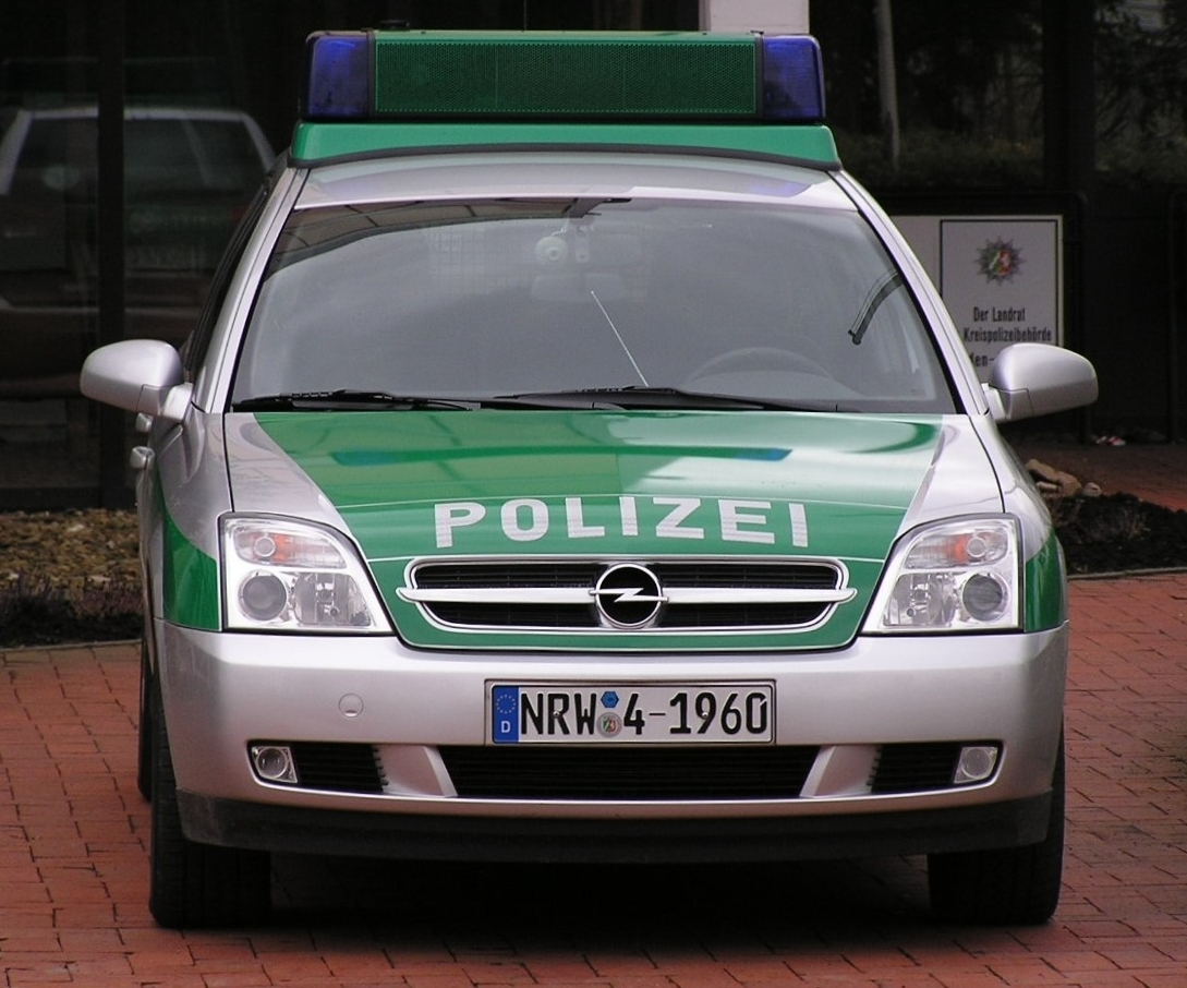 Polizeiauto der NRW Polizei mit neuem Kennzeichen